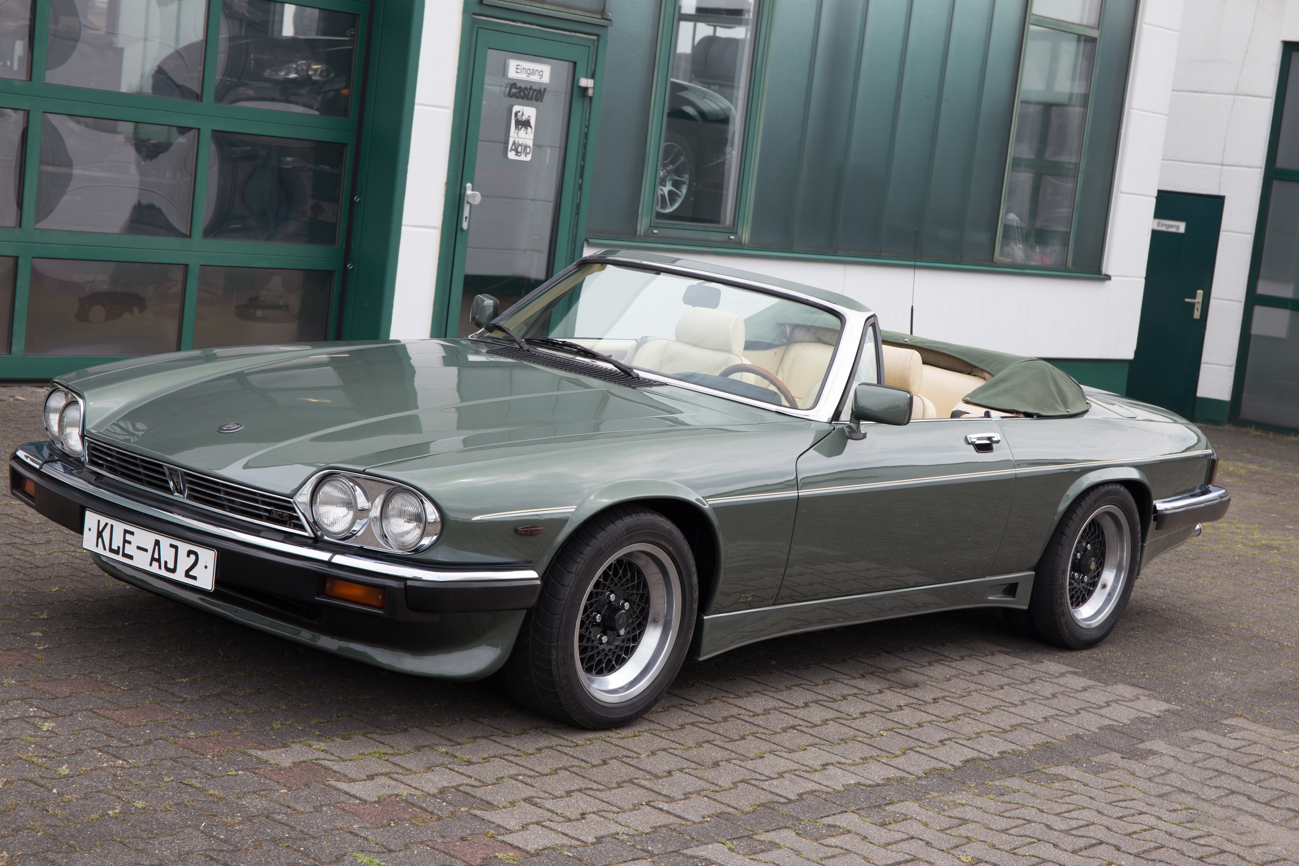 1985 entstand der Arden AJ 2 auf Basis des Jaguar XJS, das erste Jaguar Vollcabrio nach dem legendären E-Type. Arden Werksfoto Fotograf Benedict Deffur, 2017